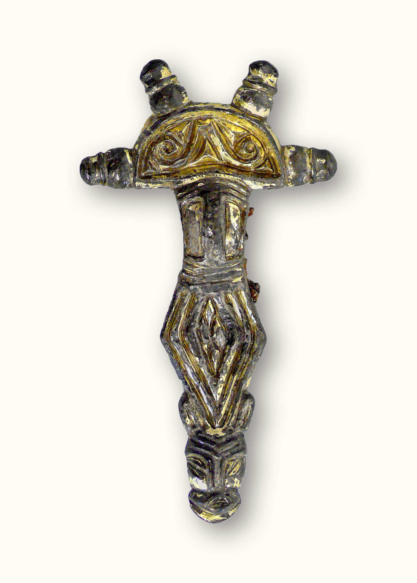 Eine seltene Vierknopffibel aus massivem Silber mit Goldauflage, Hansestadt Buxtehude FG 63